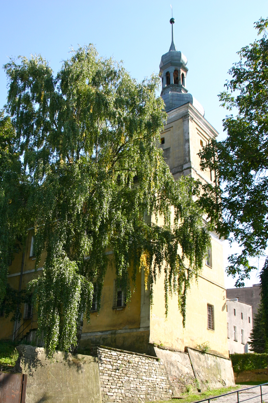 Biała (dodatkowa nazwa w j. niem. Zülz) – to miasto w woj. opolskim, w powiecie prudnickim.